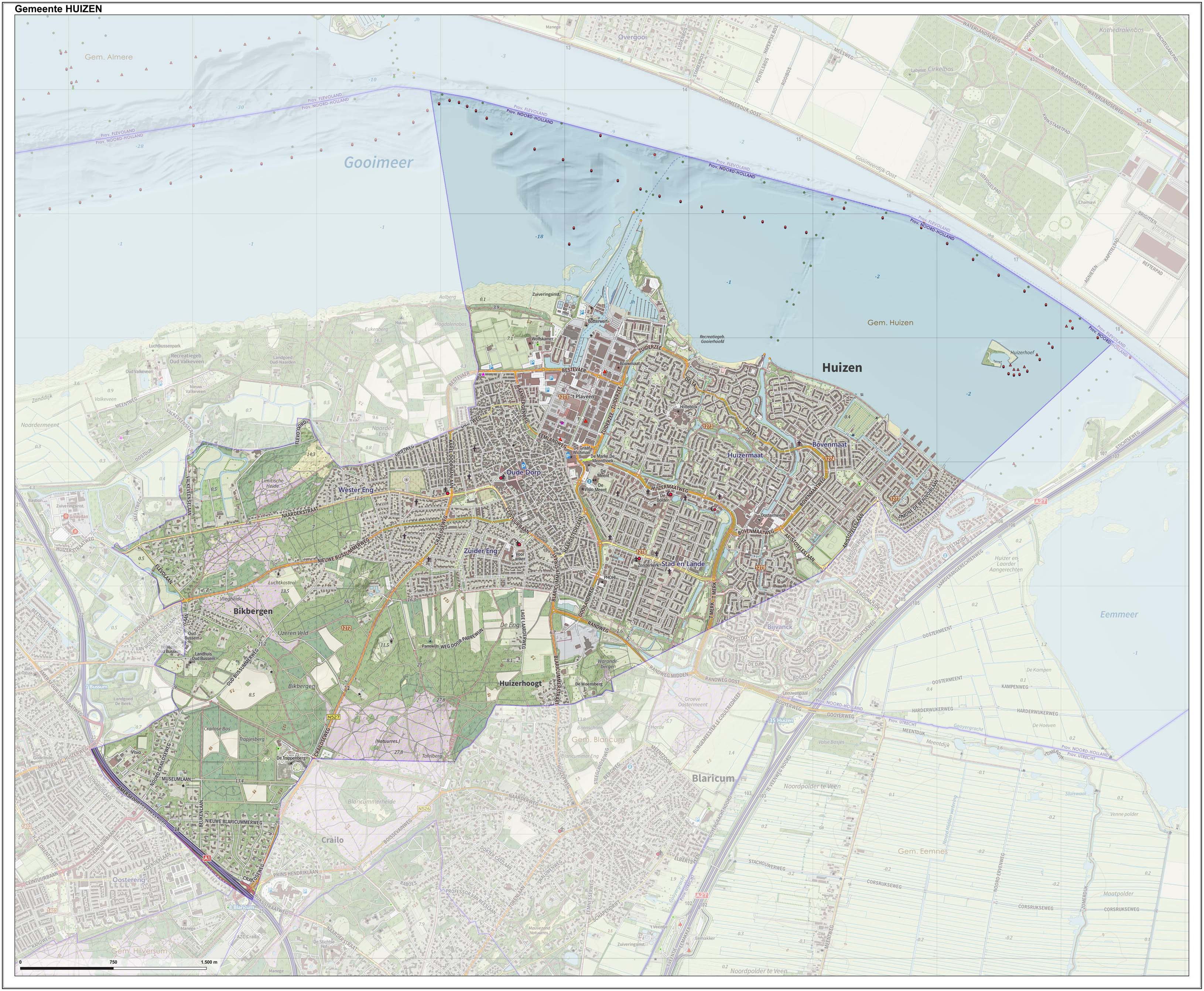 Topografische gemeentekaart. Resolutie: 400 pixels/km. Kaartbeeld samengesteld uit de open geodata van de Top10NL en Top25namen (Kadaster), Creative Commons-BY licentie. Gebouwvlakken uit open geodata BAG extract. Wegen uit de OpenStreetMap, OpenStreetMap community. Reliëfschaduw uit de Actuele Hoogtekaart AHN2. Samenstelling en kleurenschema: Jan-Willem van Aalst, met QGIS. Zie ook de Legenda.